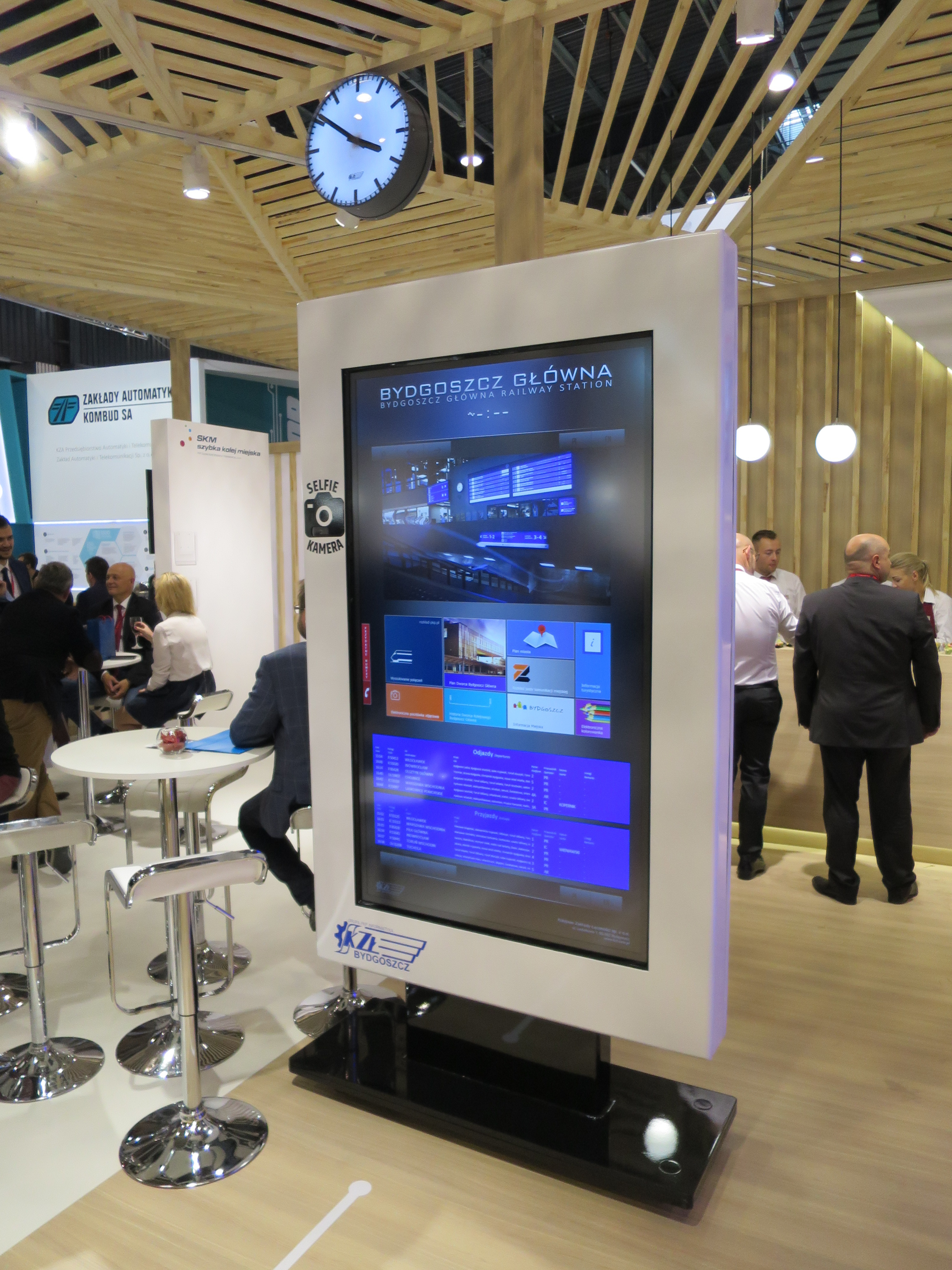 The making of this document was supported by Wikimedia Polska Association, within Wikigrant no. WG 2017-44. Infokiosk dynamicznej informacji pasażerskiej KZŁ Bydgoszcz